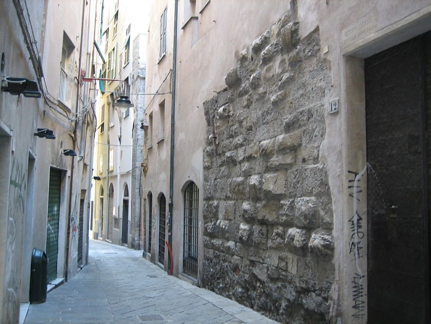 Genova - Il tratto di mura superstite fra le porte di Serravalle e di San Pietro in via Tommaso Reggio - Puerta del Castillo de Génova